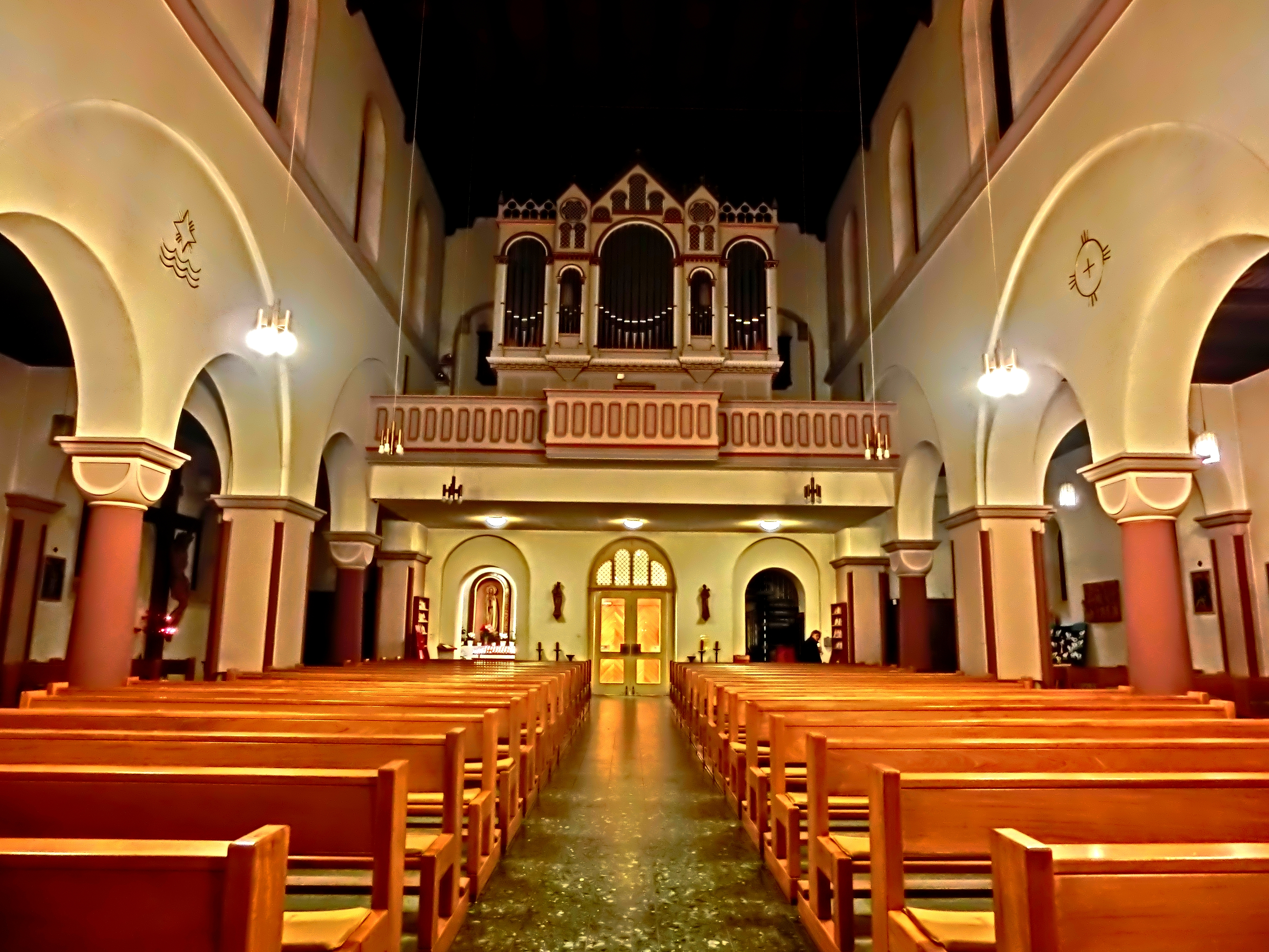 Marienkirche ist ein neuromanisches Gotteshaus in der niedersächsischen Kreisstadt Northeim. Die 1885/86 nach Plänen von Richard Herzig erbaute Kirche steht am Westrand des historischen Stadtwalls, zwischen Beitem Weg und Gardekürassierstraße. Ihre Pfarrgemeinde gehört zum Dekanat Nörten-Osterode im Bistum Hildesheim.